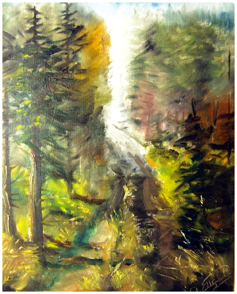 Oljemälning av Frederik Ellgaard, "Skogsväg" ca 1960-tal